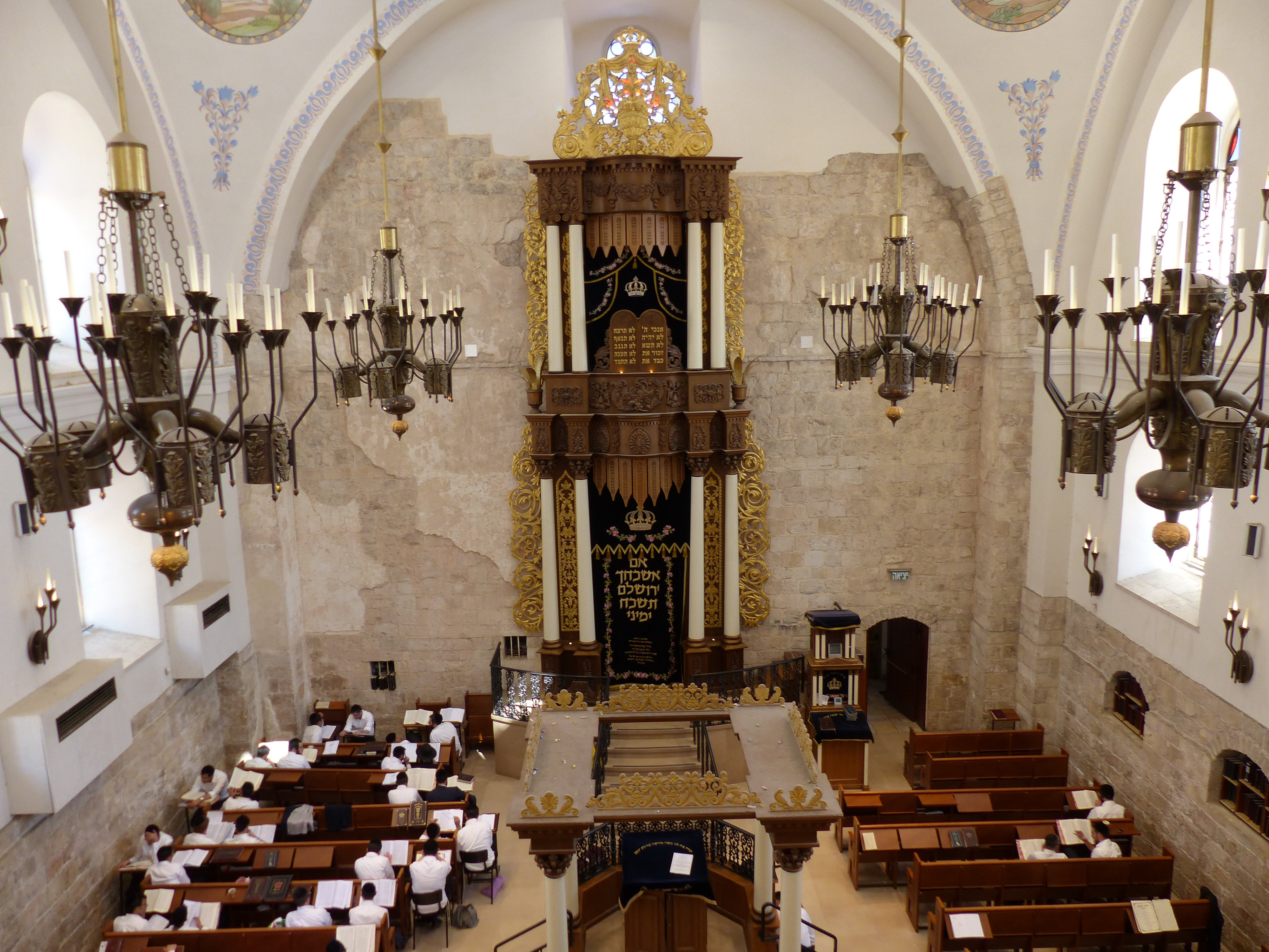 Interior de la sinagoga Hurva, Jerusalén